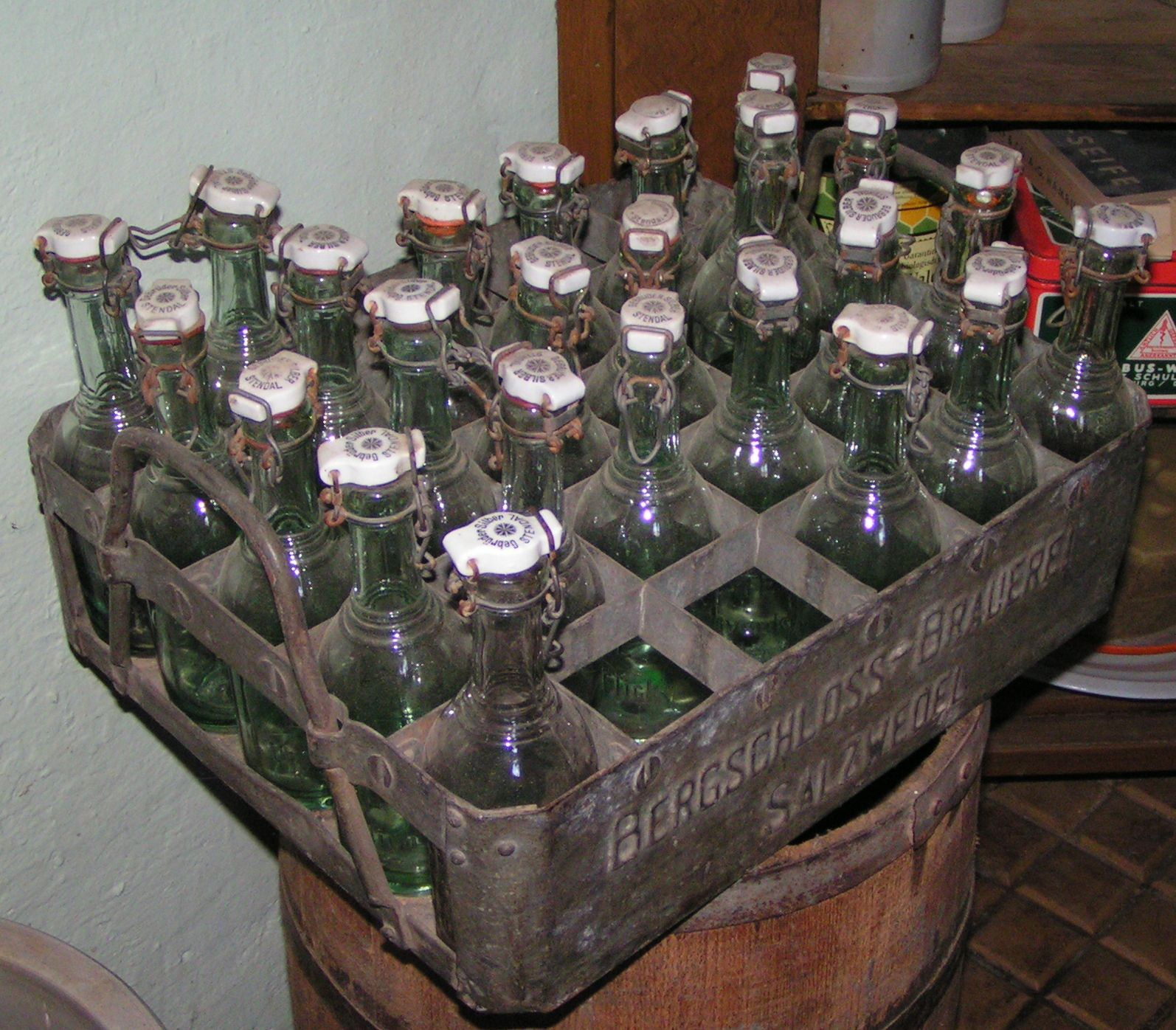 Historischer Bierkasten auf dem Roscheider Hof bei Konz (1. August 2004)